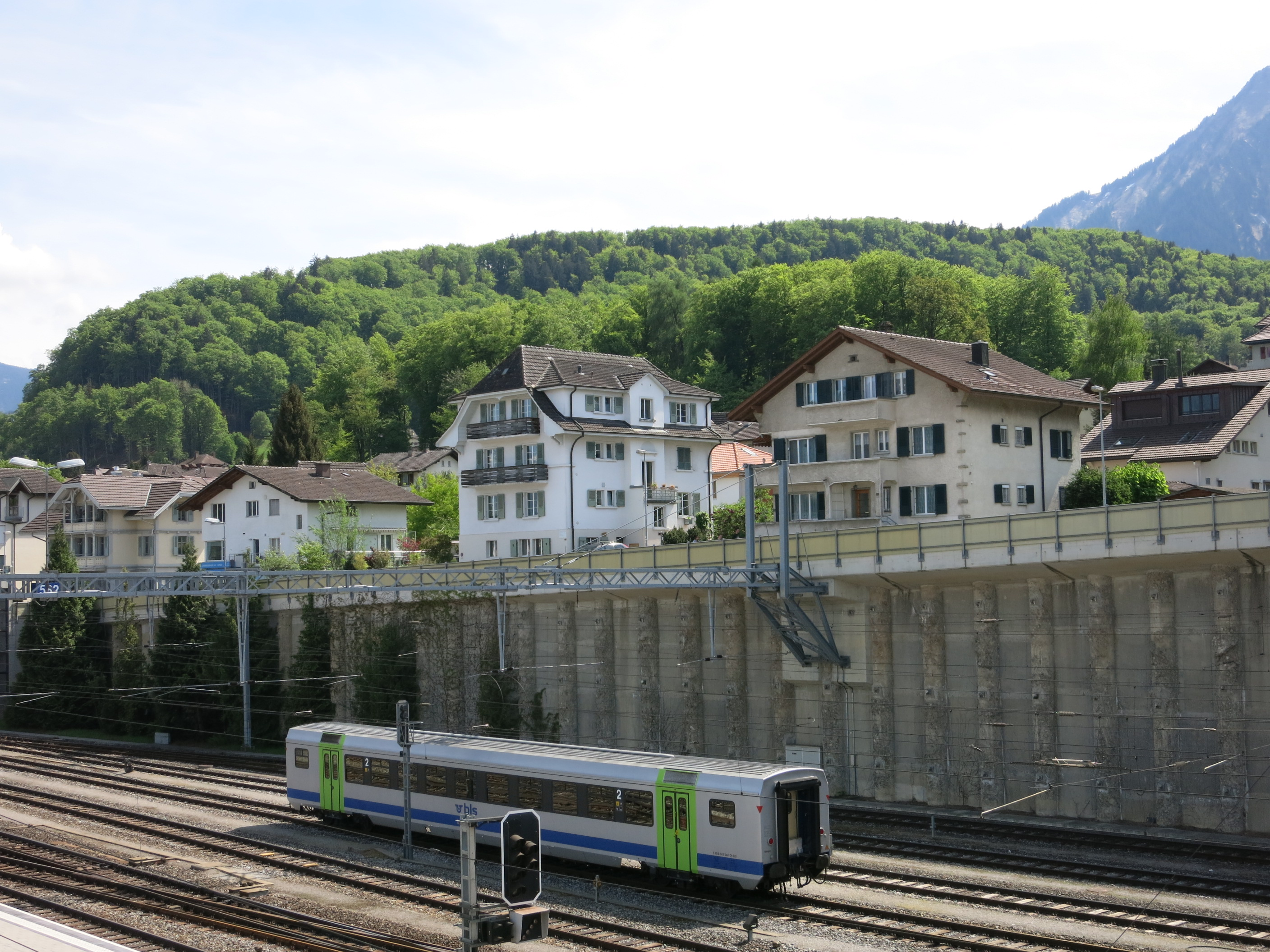 Hondrichhügel Spiez BE, Schweiz